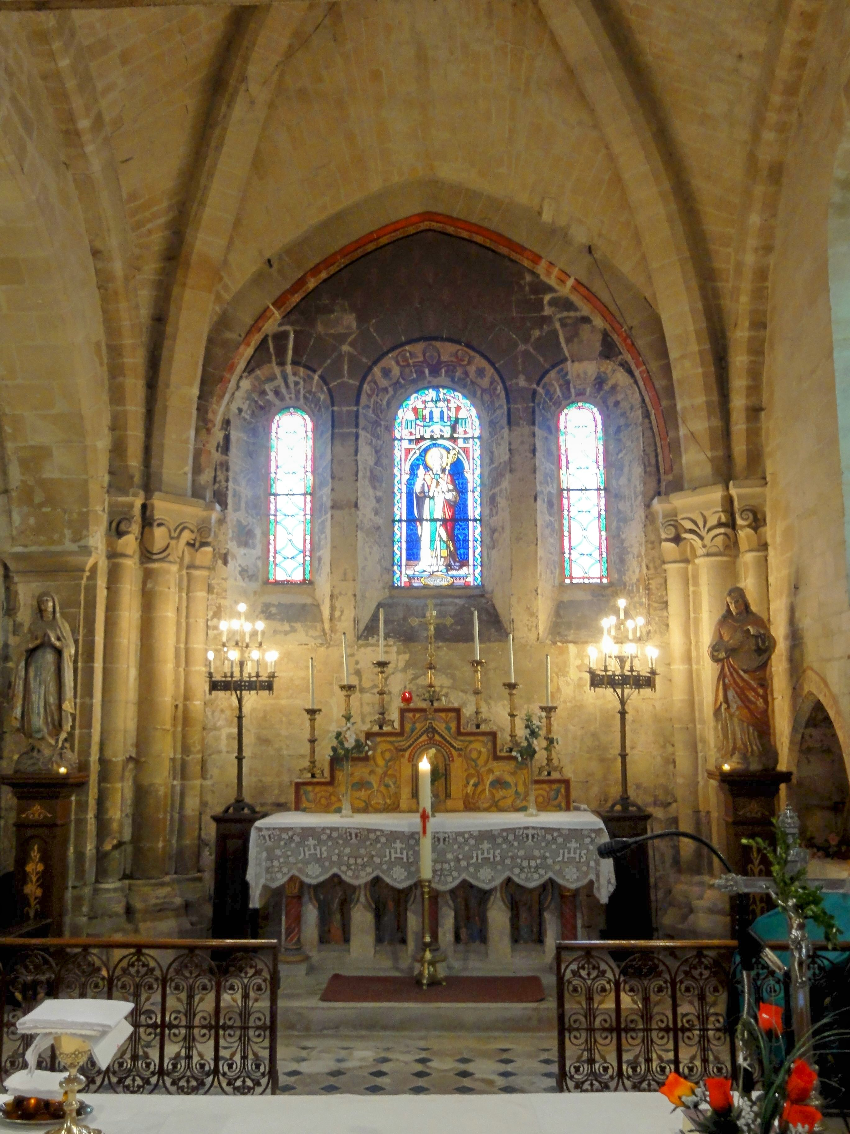 Le chœur.